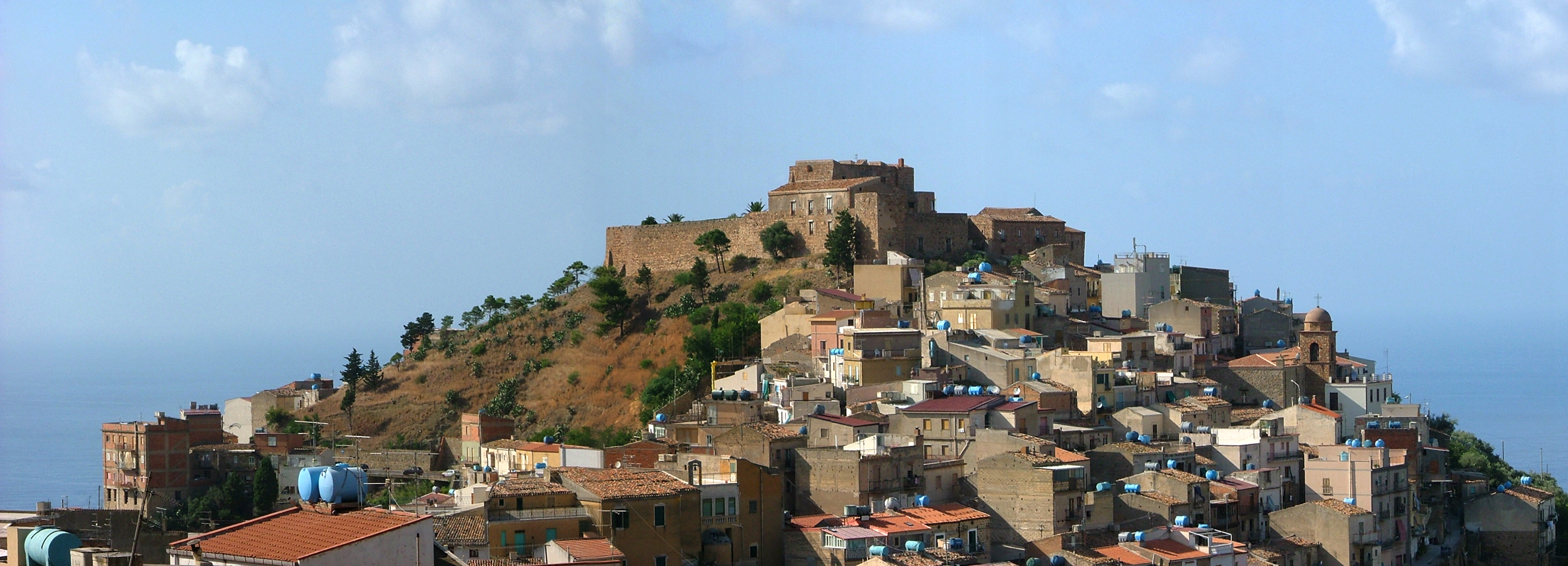 Panorama di Caronia